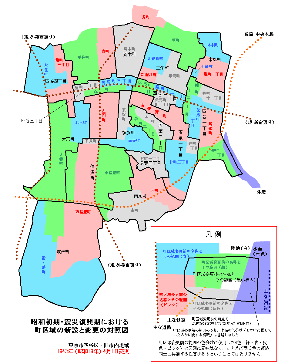 町区域の新設と変更の対照図 東京市四谷区・旧市内地域